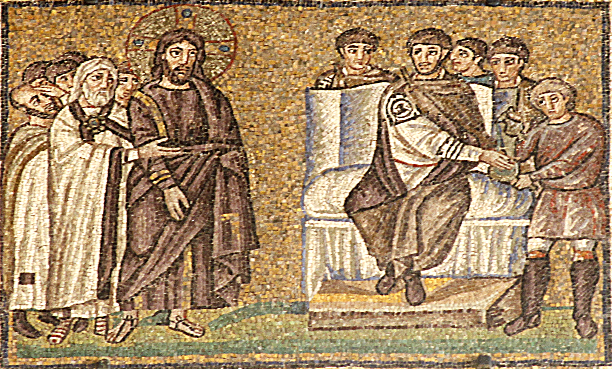 Sant'Apollinare Nuovo - Ravenna